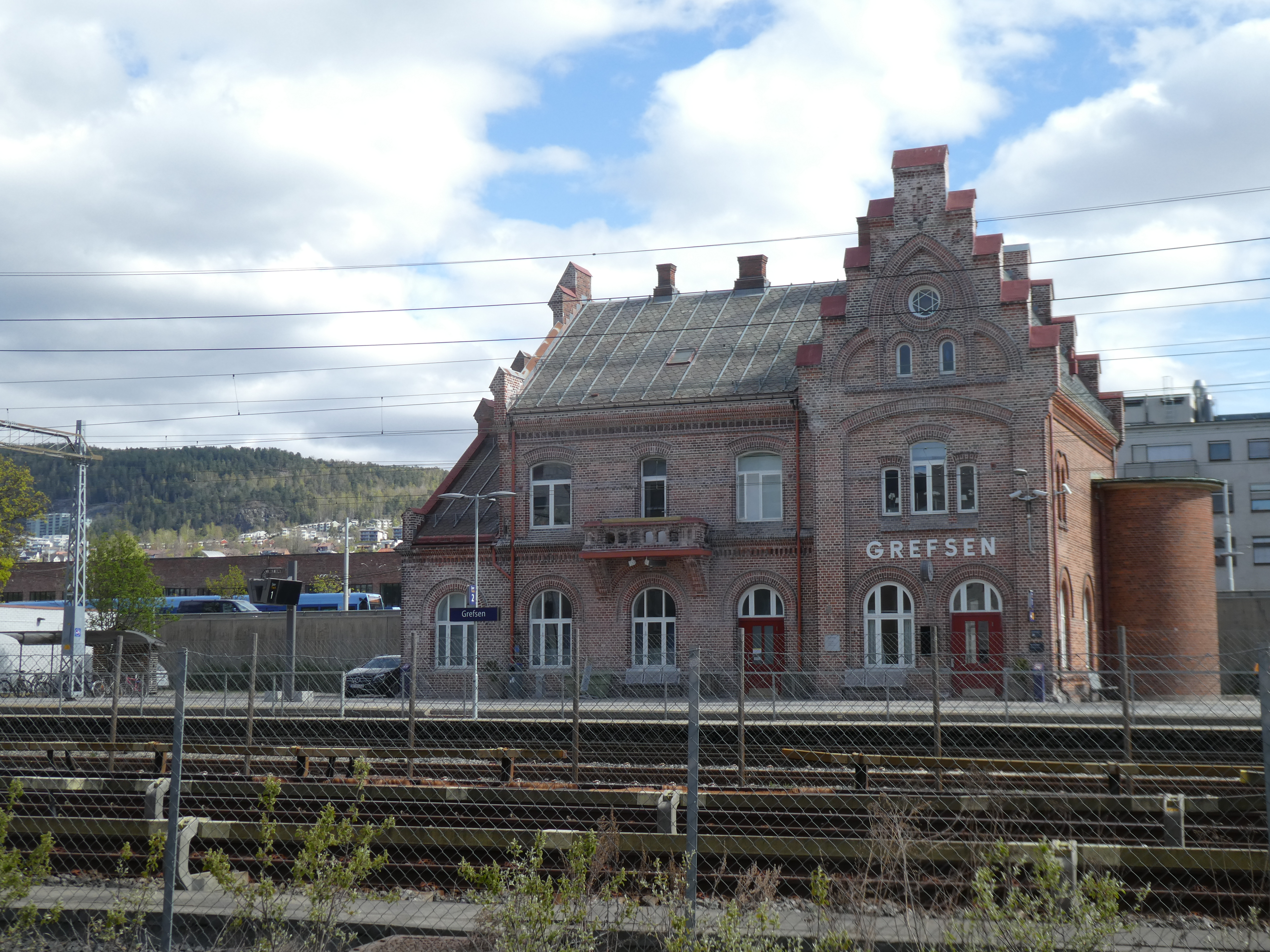 Bahnhof Grefsen (Oslo)